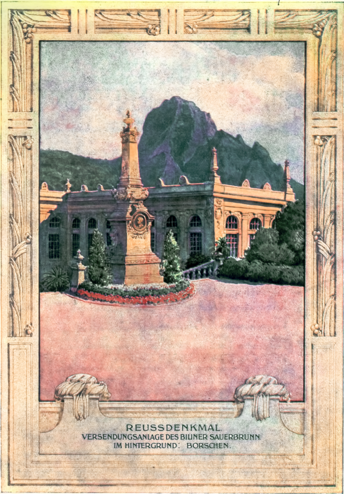 Werbepublikation: Reussdenkmal im Kurort Bilin, direkt bei Versendungsanlage